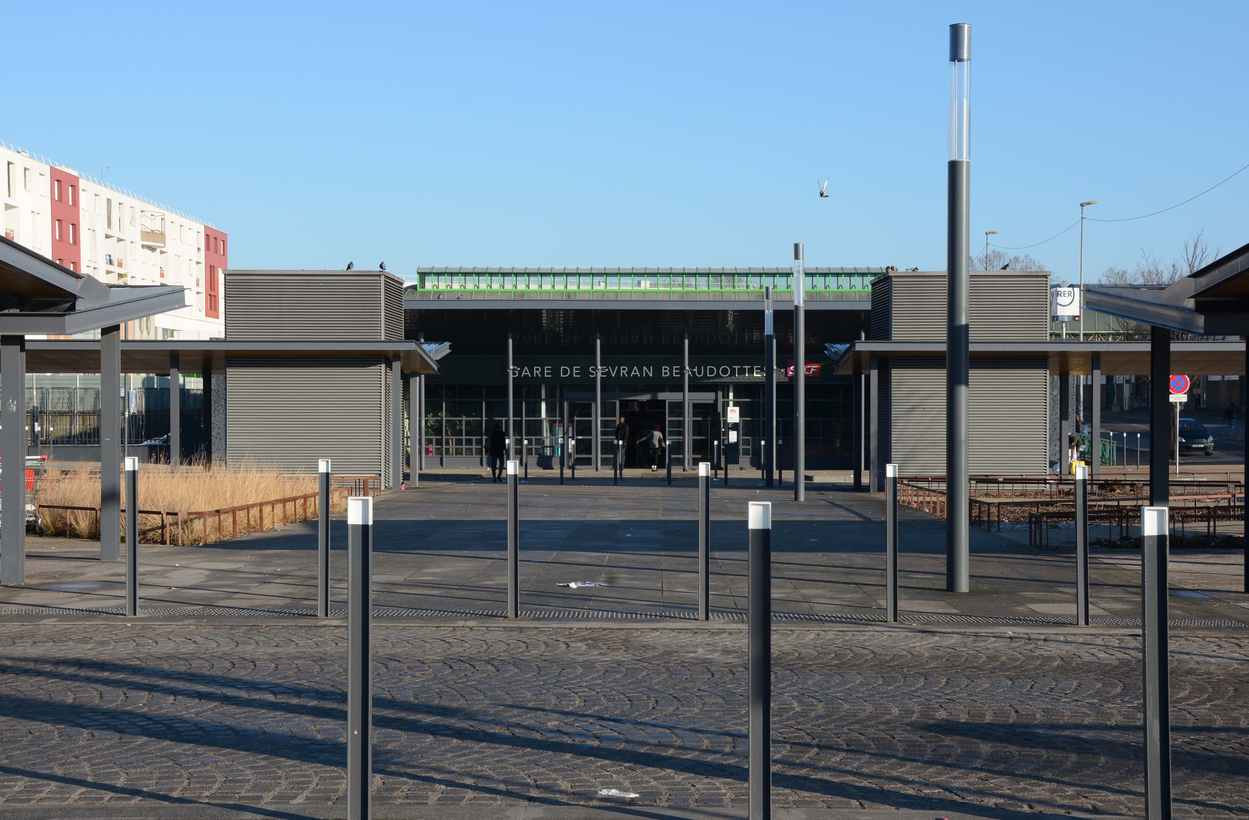 Vue sur la gare routière et l'entrée de la gare RER B de Sevran Beaudottes.